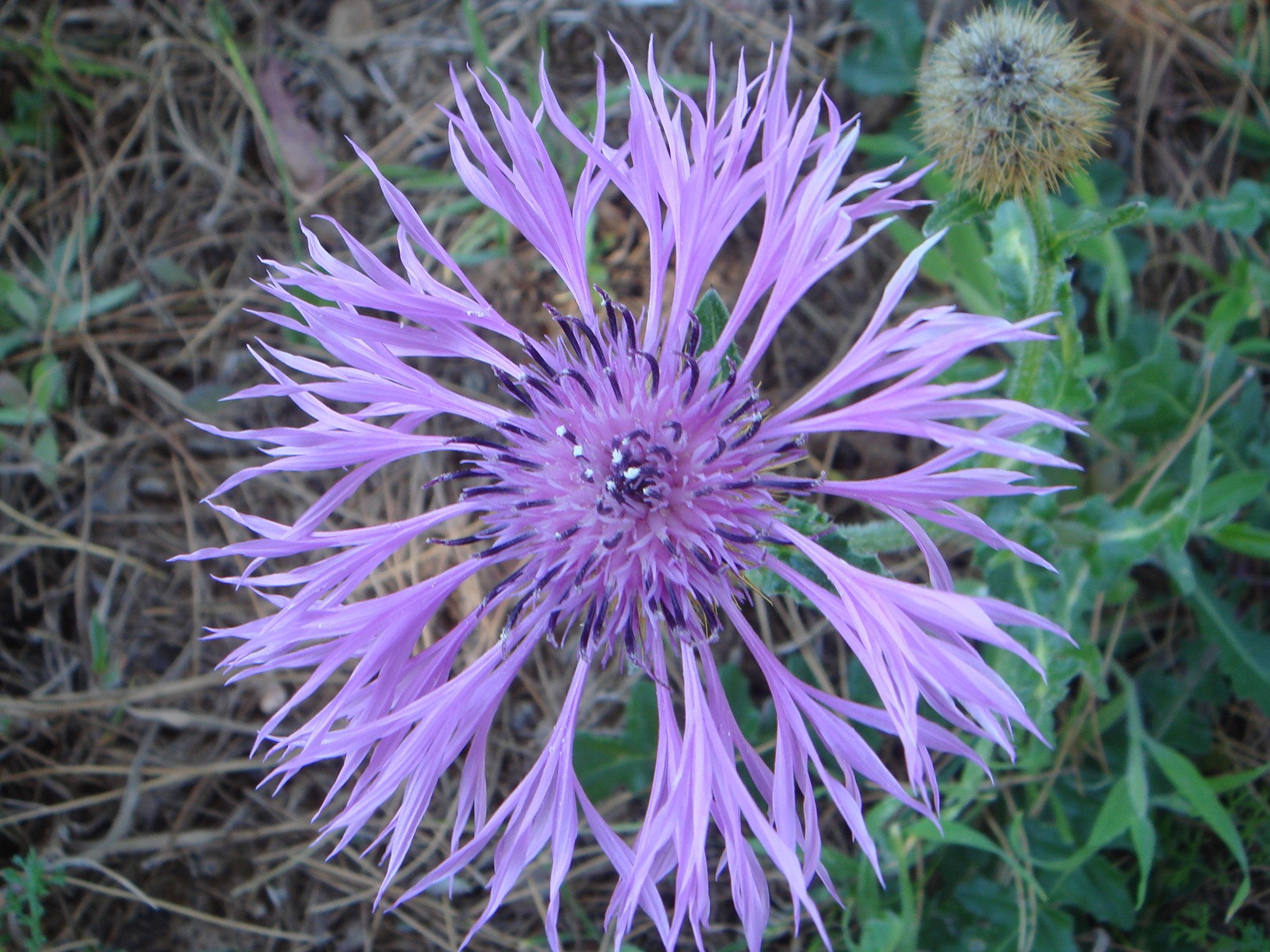 Centaurea sphaerocephala, Chiclana, Cádiz España